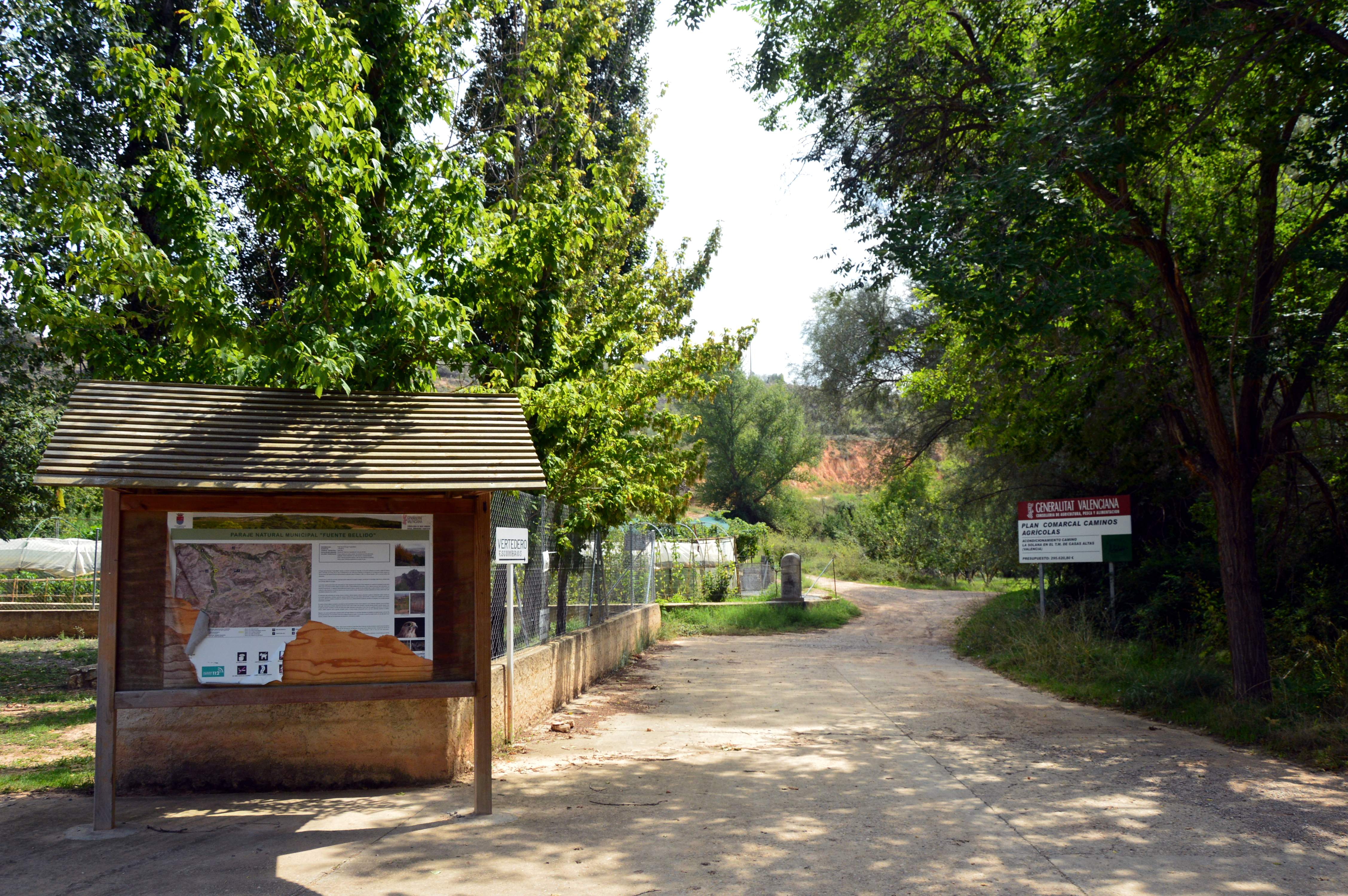 Panel informativo del Parque Natural Municipal "Fuente Bellido" en Casasaltas (Valencia), 2018.